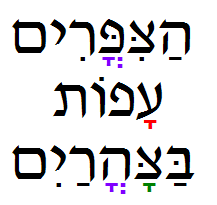 עבור הערך he:קמץ. מדגימה קמץ קטן, קמץ גדול וחטף קמץ.